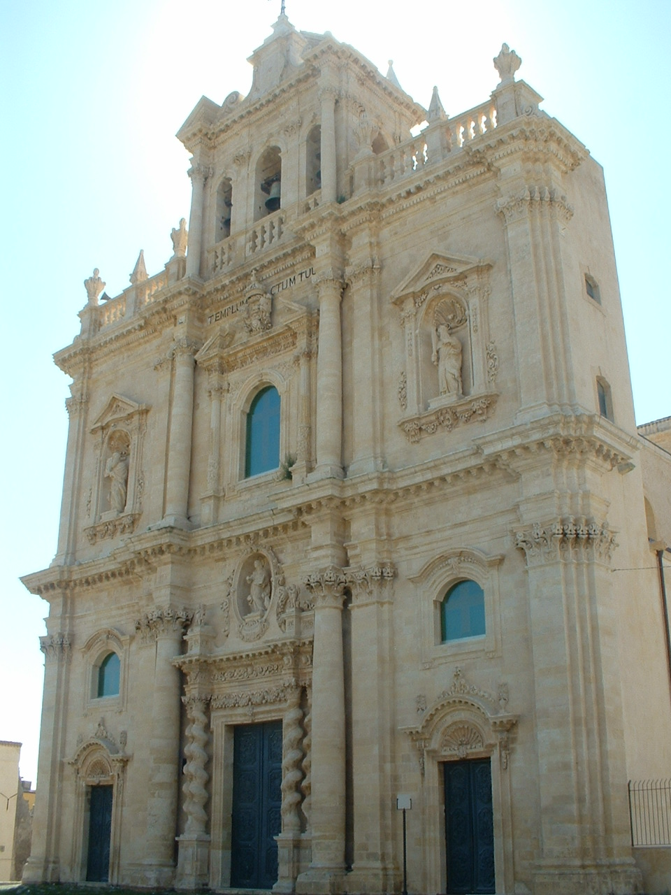 Sortino (SR), Chiesa Madre San Giovanni Evangelista(XVIII sec.)